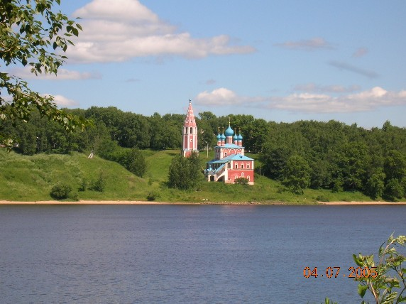 Kazanskaya Church in Romanov (now Tutayev)